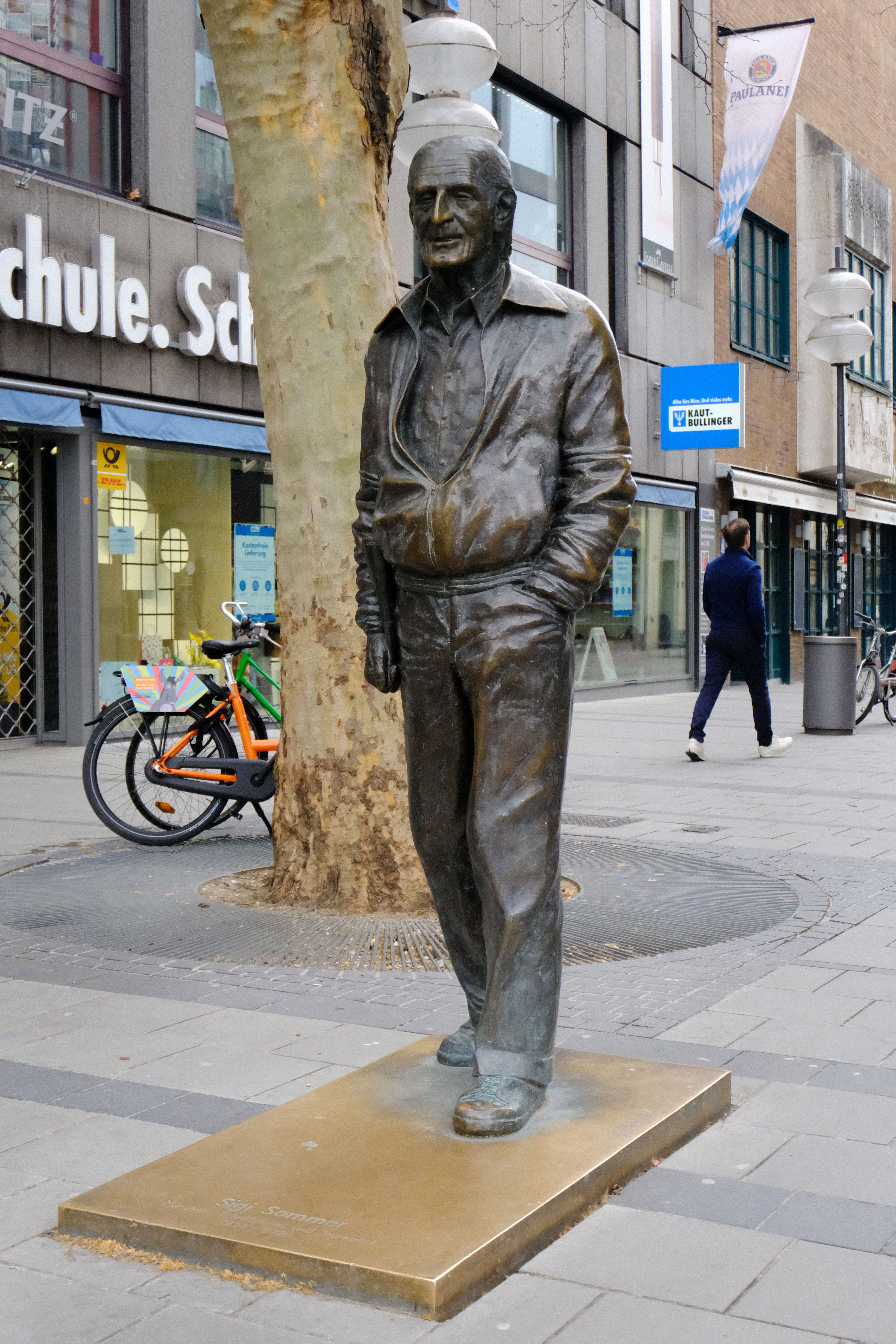 Denkmal für den Autor Siegfried Sommer. Bronzestatue „Der Spaziergänger" von Max Wagner am Roseneck in der Rosenstraße, München (2020)